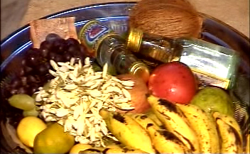 I, Vaikunda Raja took this photo graph